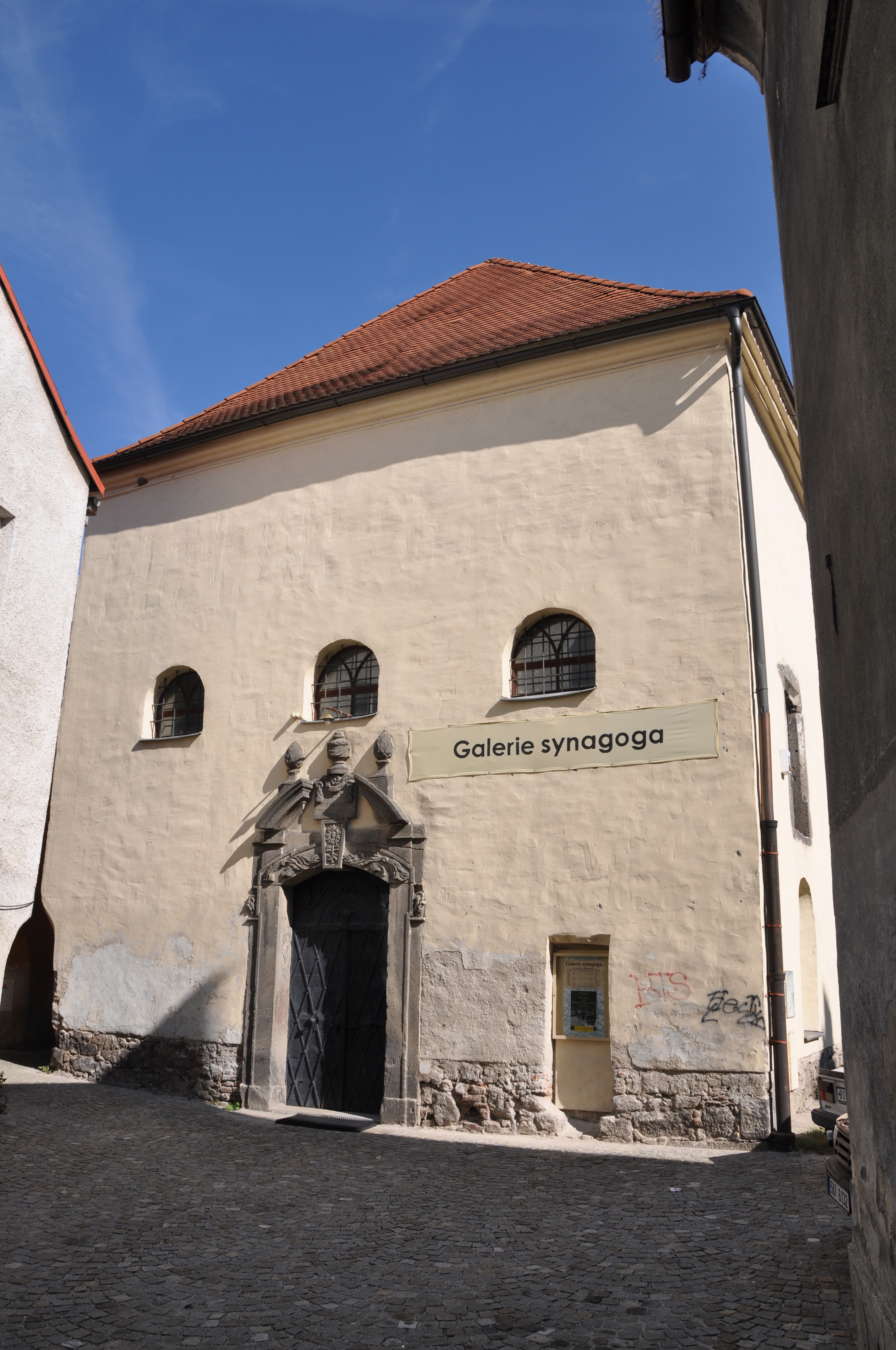 Stará synagoga ve Velkém Meziříčí